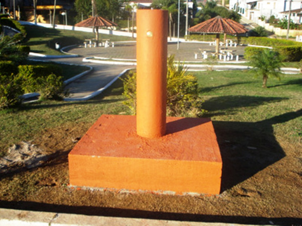 Marco da cidade de Apiaí